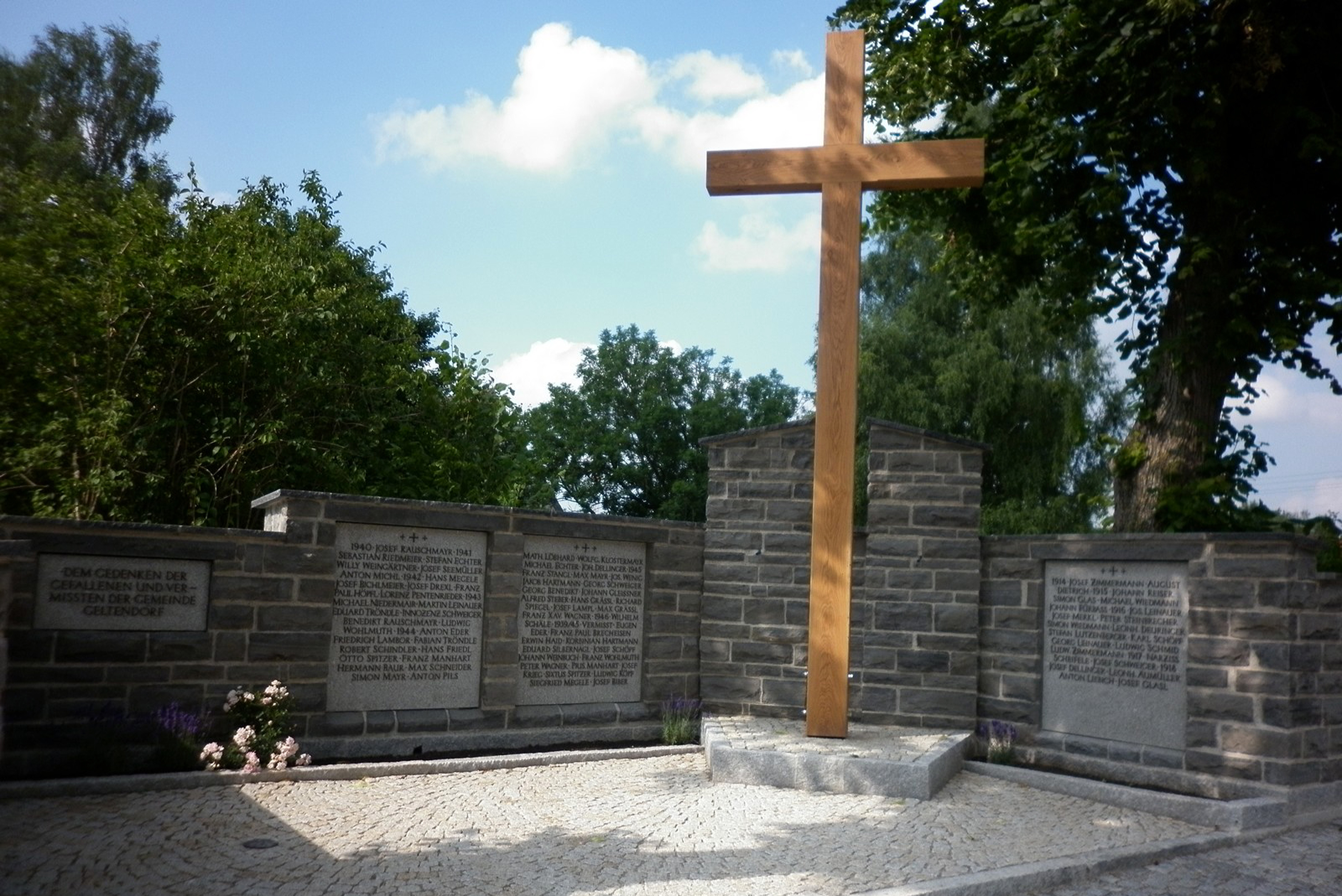 Kriegerdenkmal in der Gemeinde Geltendorf an der Umfassungsmauer der Kirche St. Stephan nach der Restaurierung im Jahr 2012.